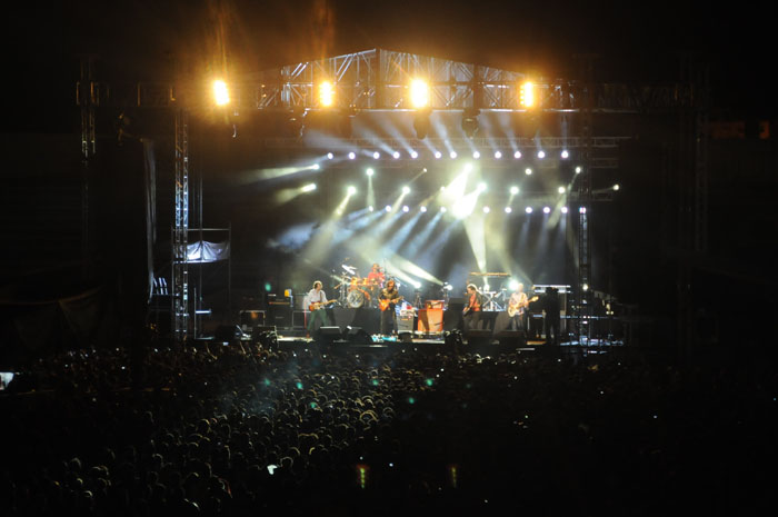 Caifanes en el cierre de la Feria Nacional de Zacatecas 2012